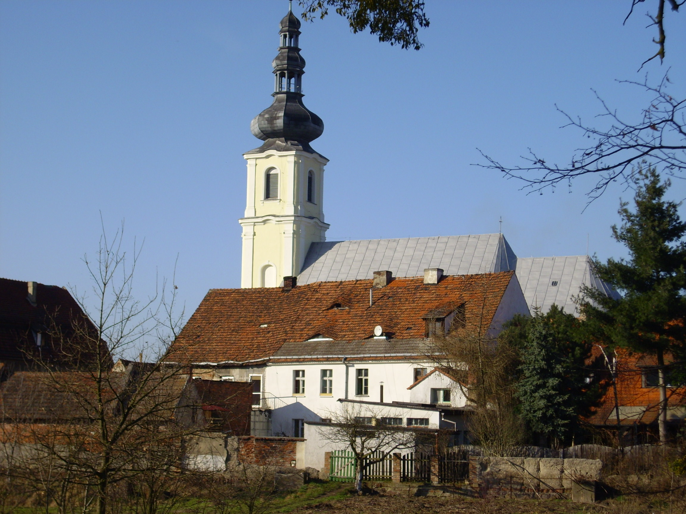 Uraz. Widok ogólny.